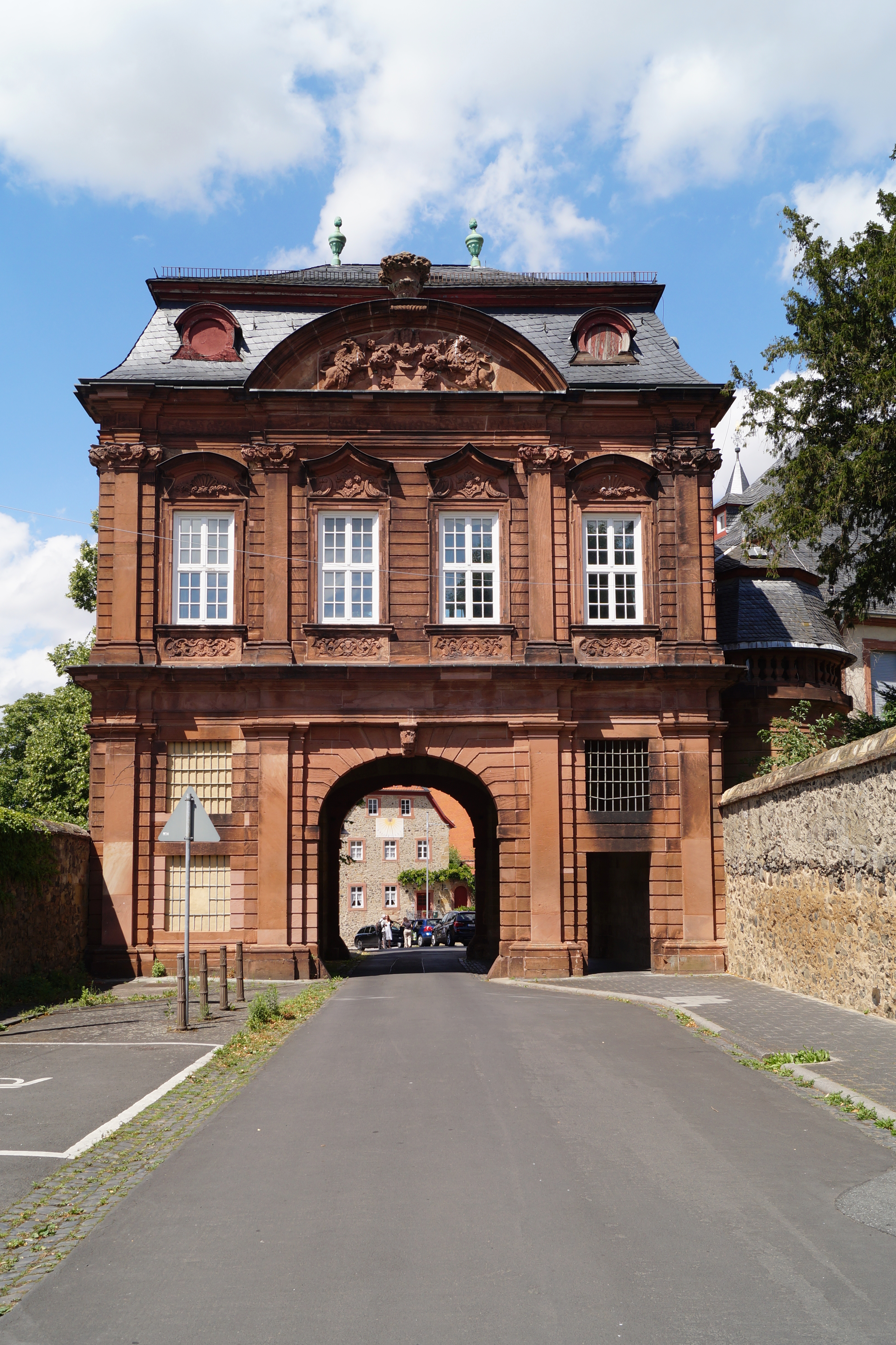 Sogenannter "Gottfriedsbogen", barockes Oberes Tor des Kloster Ilbenstadt, Wetteraukreis.